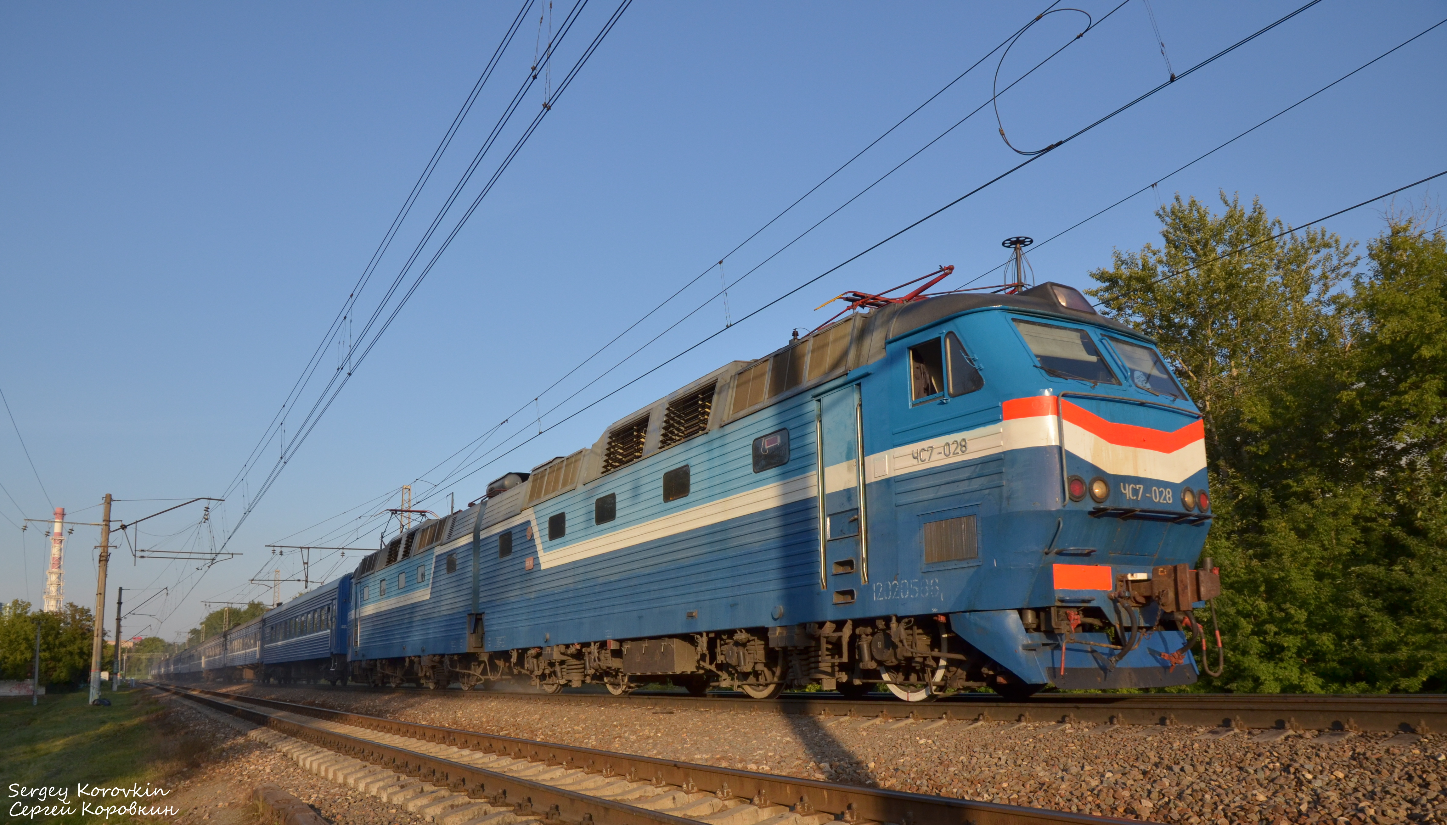 ЧС7-028 с поездом 195Б Москва - Брест